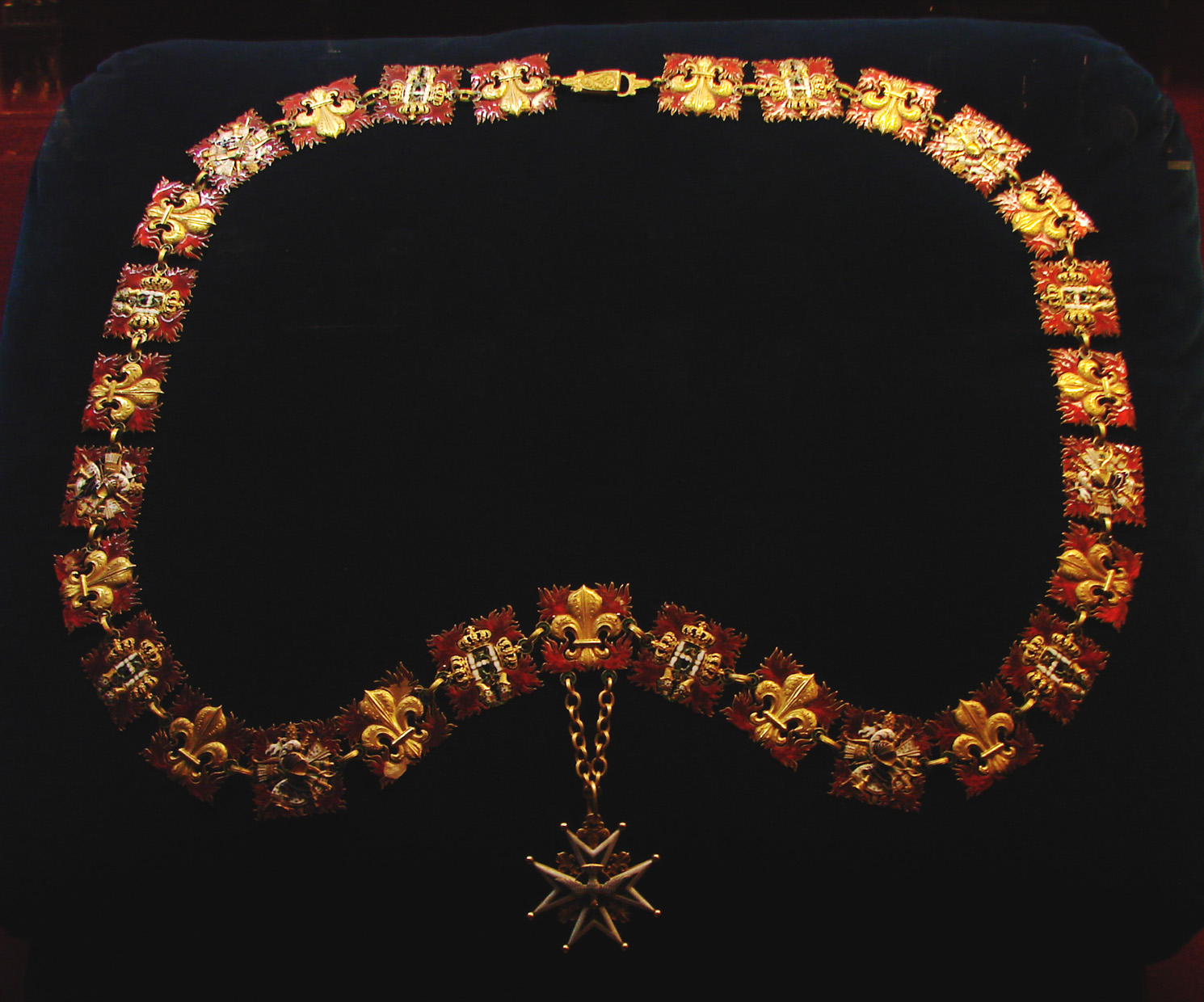 Collier de l'ordre du Saint-Esprit (époque non précisée, vitrine du sacre de Charles X), dépôt du Comte de Paris, Palais du Tau, Reims.